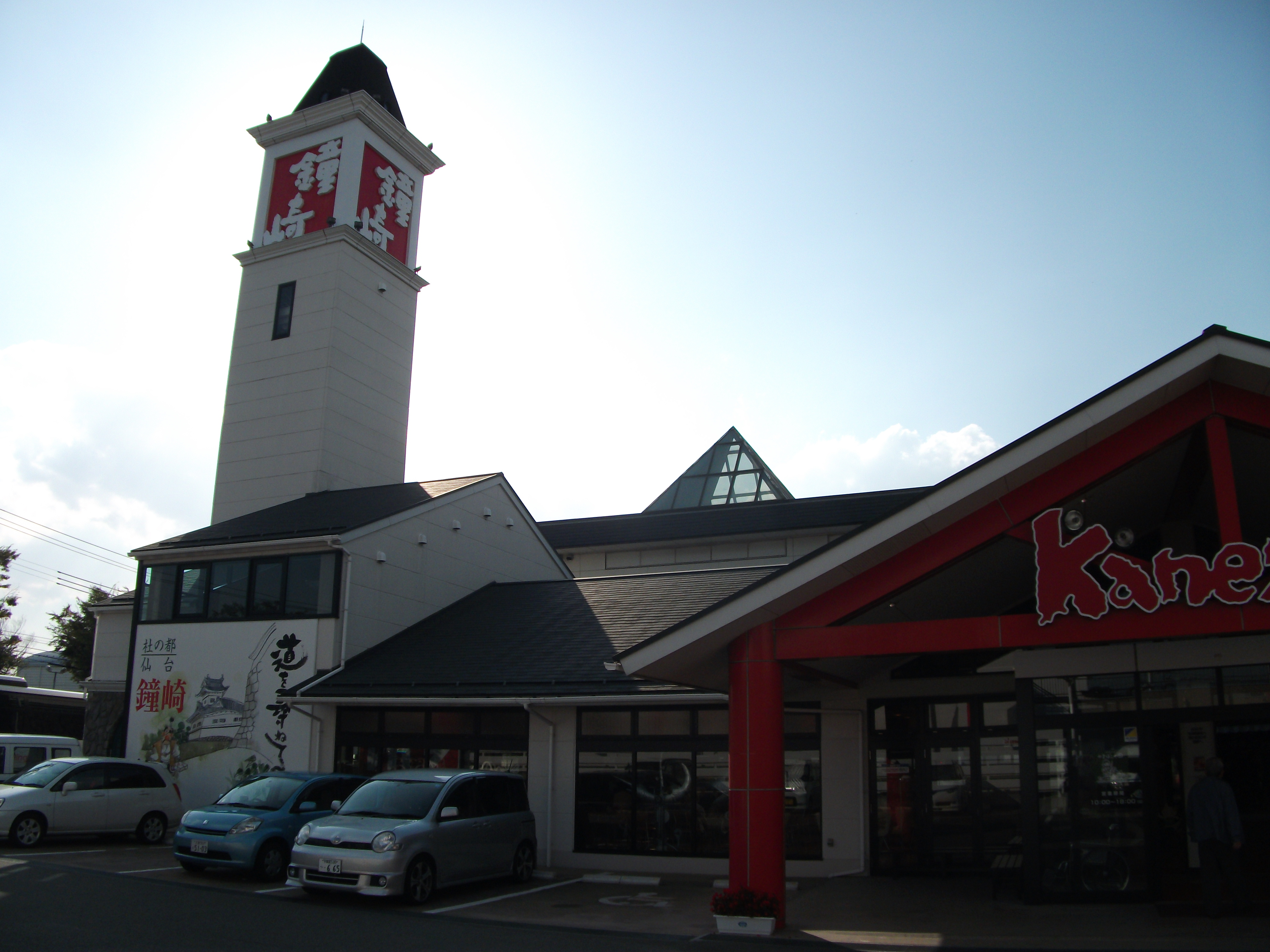 仙台市若林区、鐘崎食品館